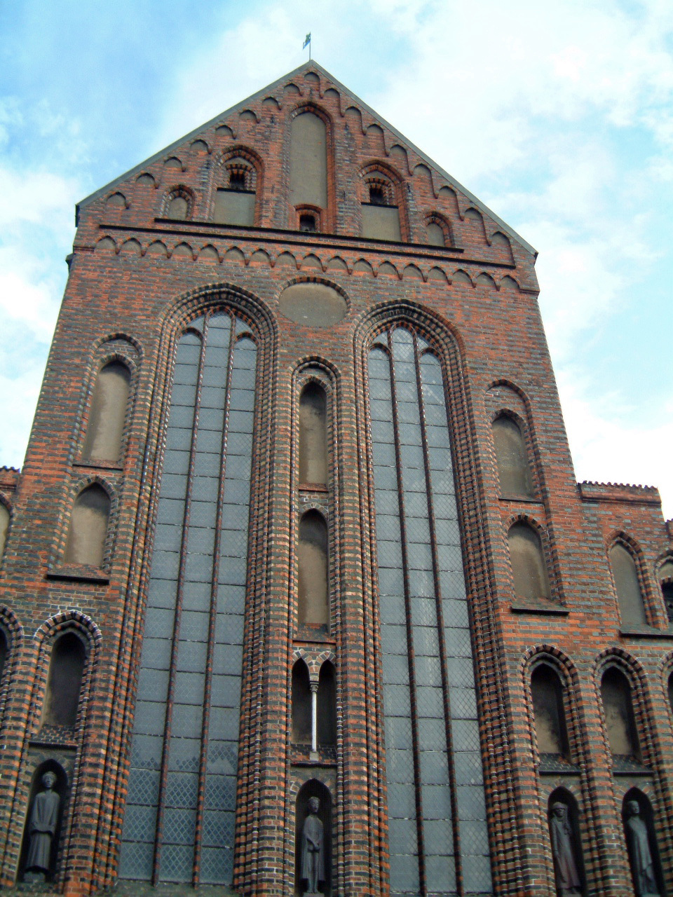 Lübeck: Fassade der Katharinenkirche mit Skulpturen von Ernst Barlach, 1. von links und Gerhard Marcks